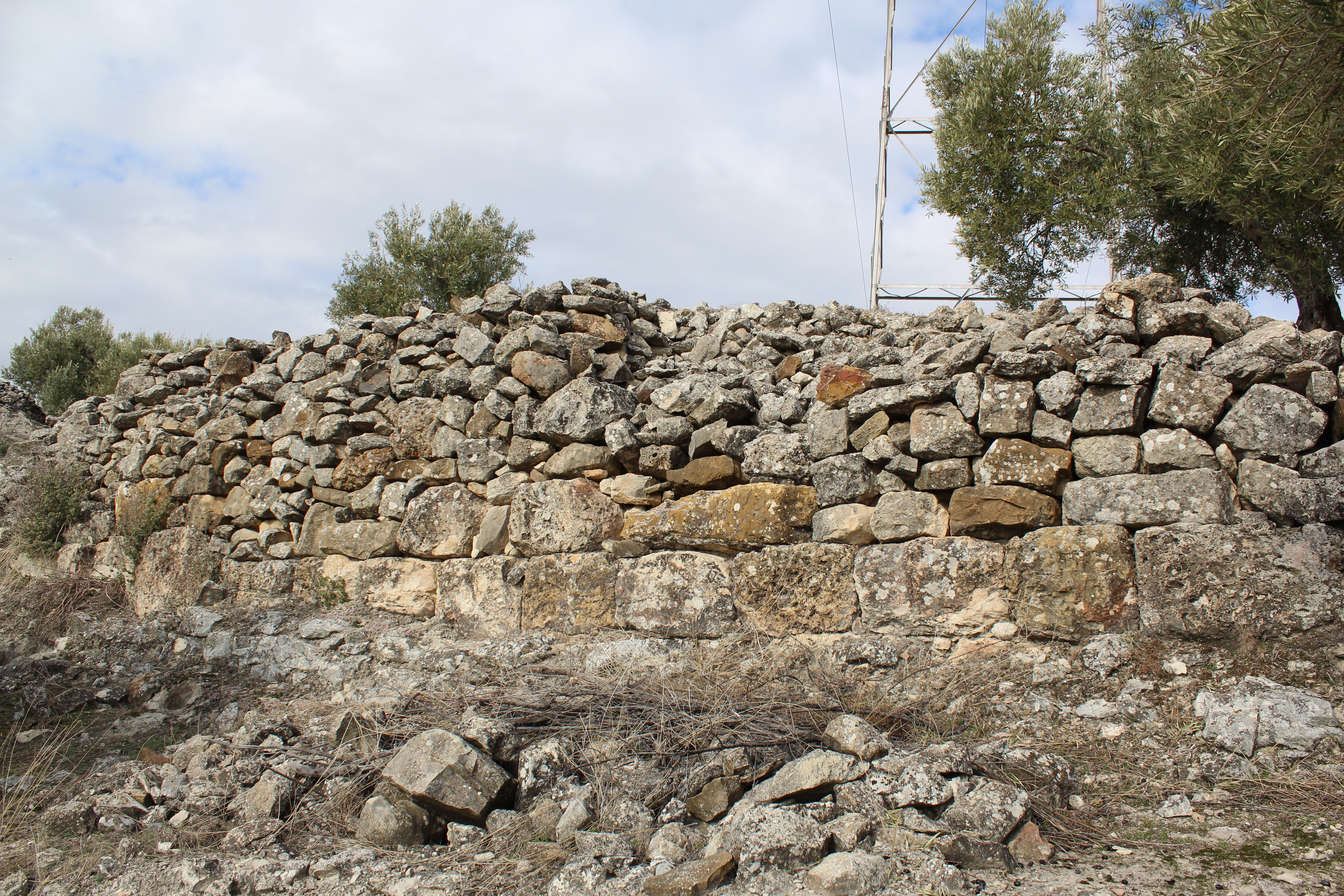 Sillares componiendo una de las murallas defensivas de Atalayuelas.